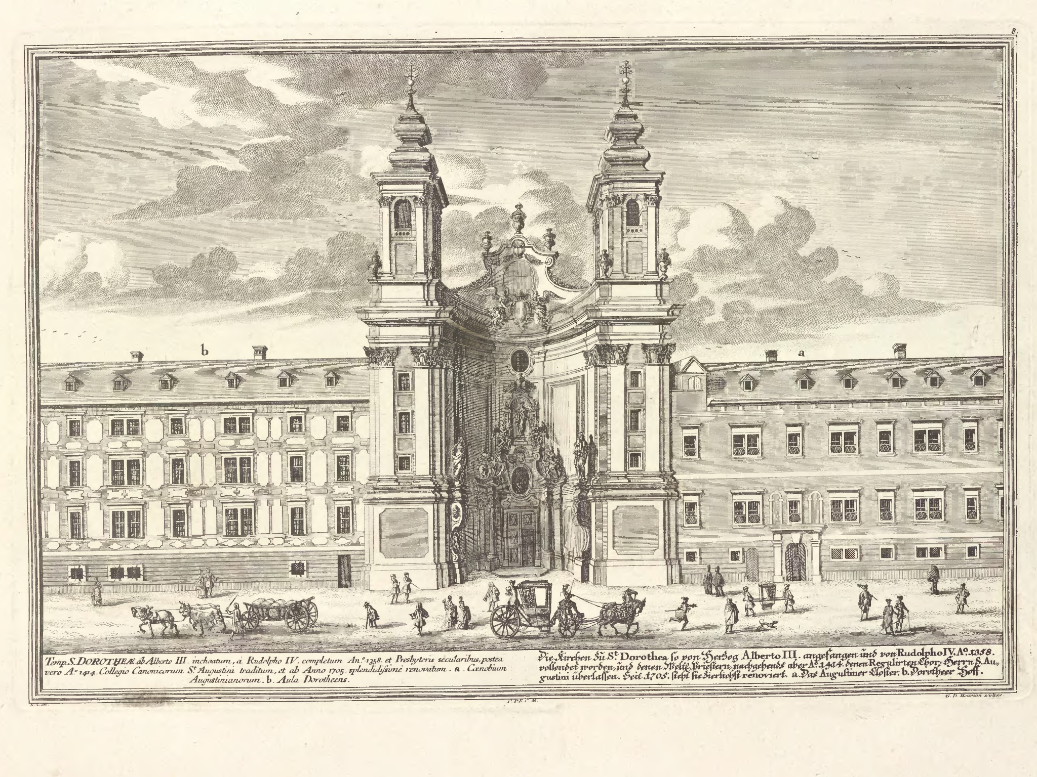 Die Dorotheerkirche in Wien 1724 am Standort des heutigen Dorotheum.